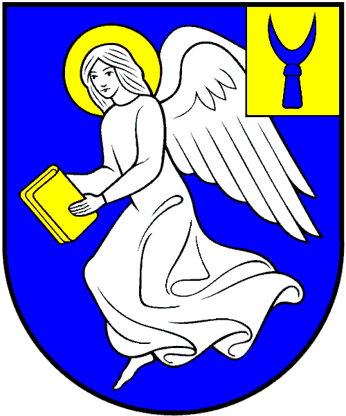 Kategorija:Lietuvos gyvenviečių herbai